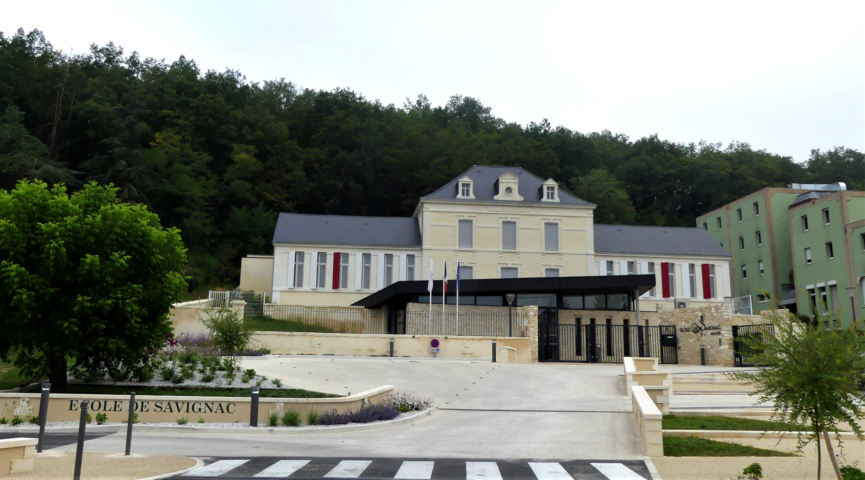 L'école hôtelière de Savignac-les-Églises, Dordogne, France.